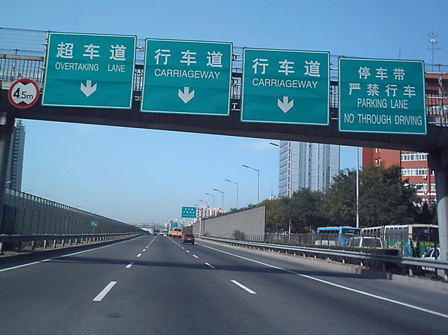 北京京通快速公路的车道标志 (DF08 (中文) 2004年图片)